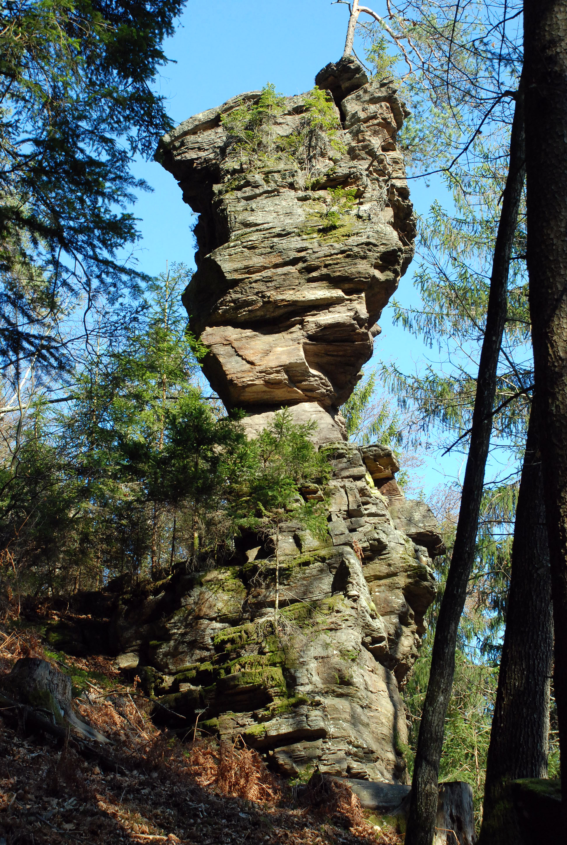 Mannagetta-Ofen und seine Umgebung im Mausegger Graben, Gemeinde Marhof, Steiermark, Österreich